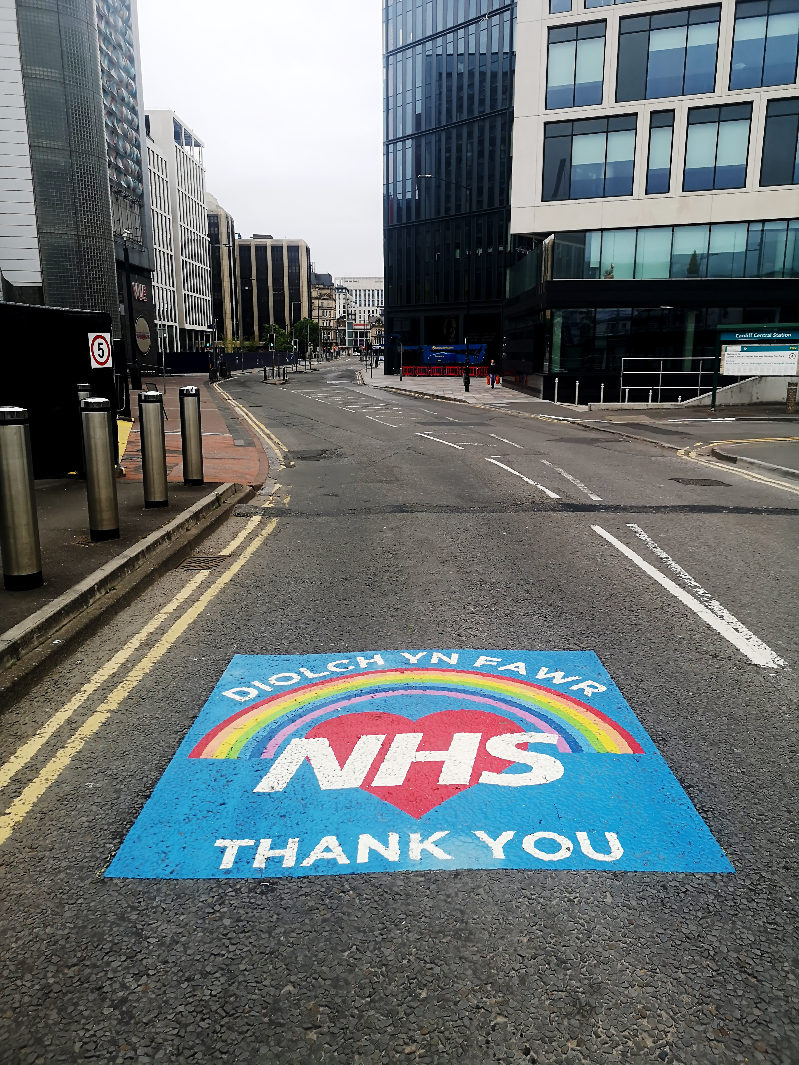 Diolch yn fawr NHS